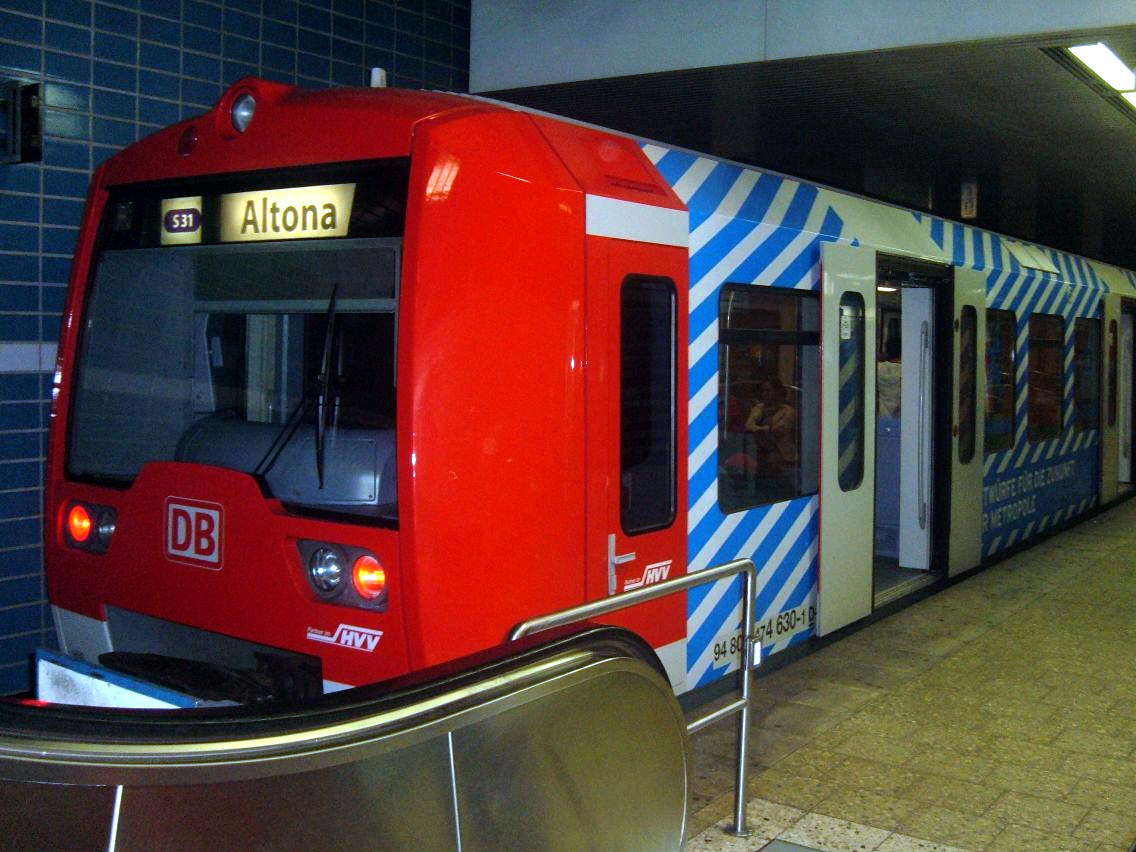 Einheit 4130 der Hamburger S-Bahn im Bahnhof Harburg-Rathaus mit IBA-Vollwerbung.